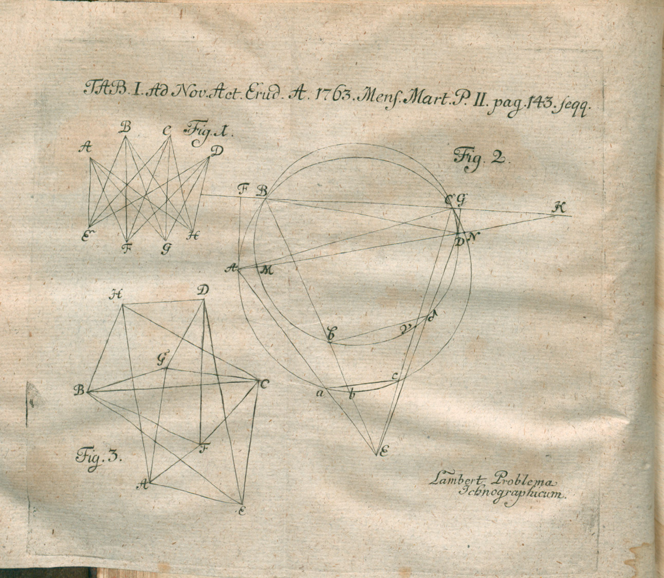 Illustration